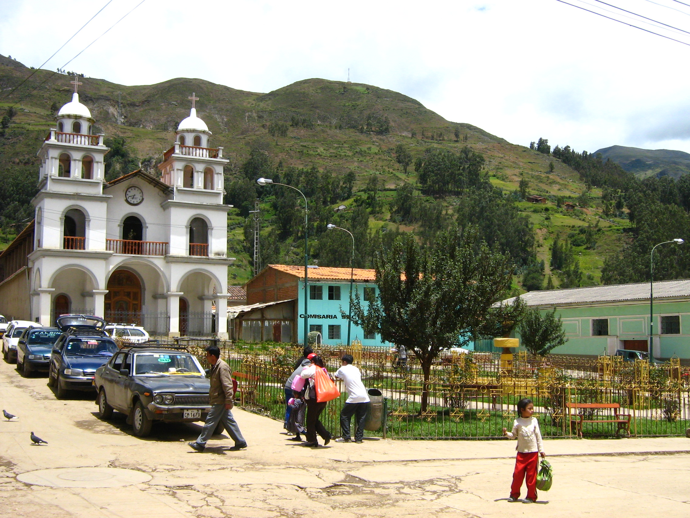 En su costado se encuentra una iglesia que guarda un perfil andino y moderno, en honor de San Francisco de Asis y memoria de los franciscanos que tuvieron un convento en Pomabamba, desaparecido en los años 1830.